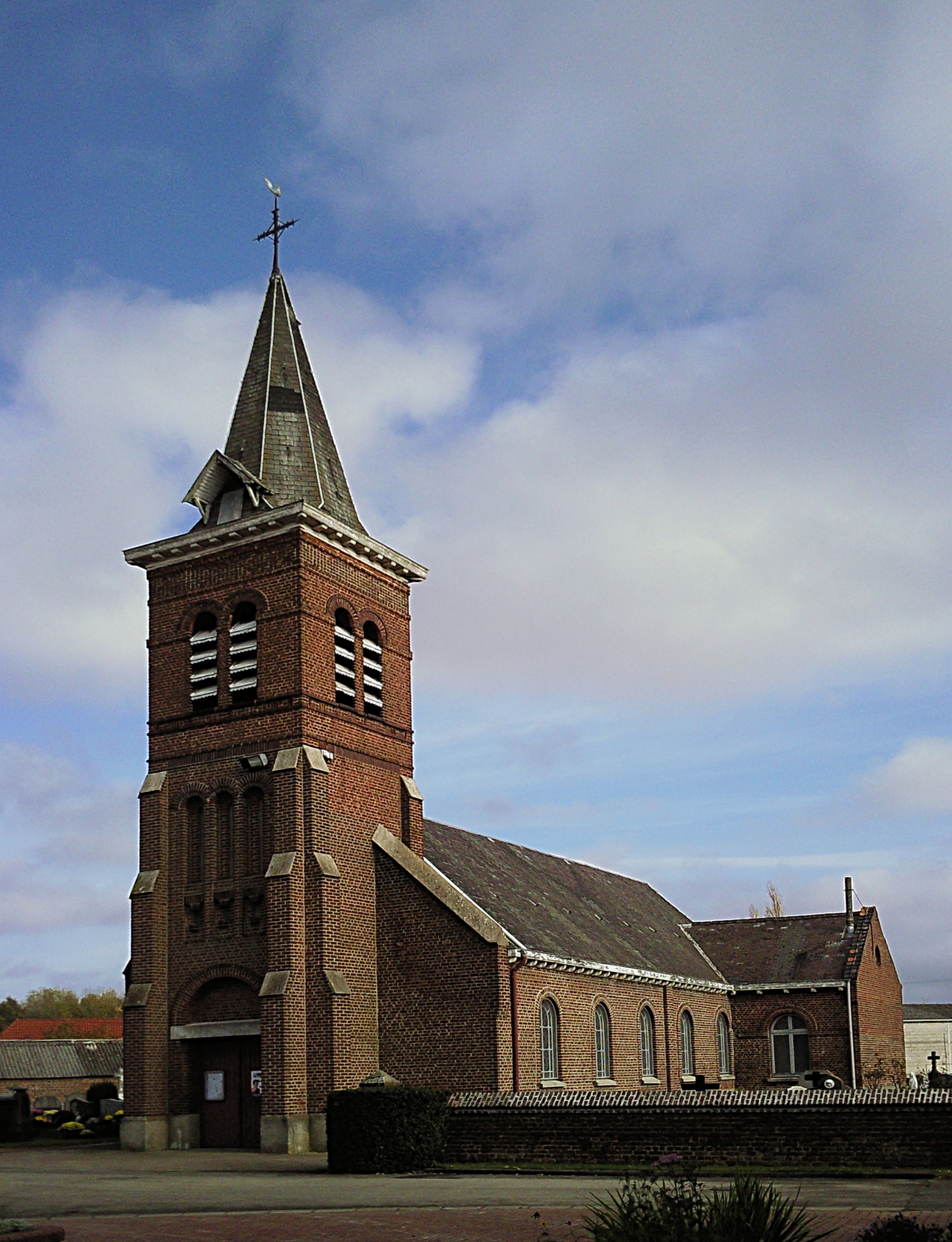 L'église Saint-Vaast de Wicres (Nord). D'origine médiévale (XIIème siècle), l'église a été agrandie en 1895. Partiellement détruite au cours de la première guerre mondiale, elle est restaurée et réouverte au début des années 1920.